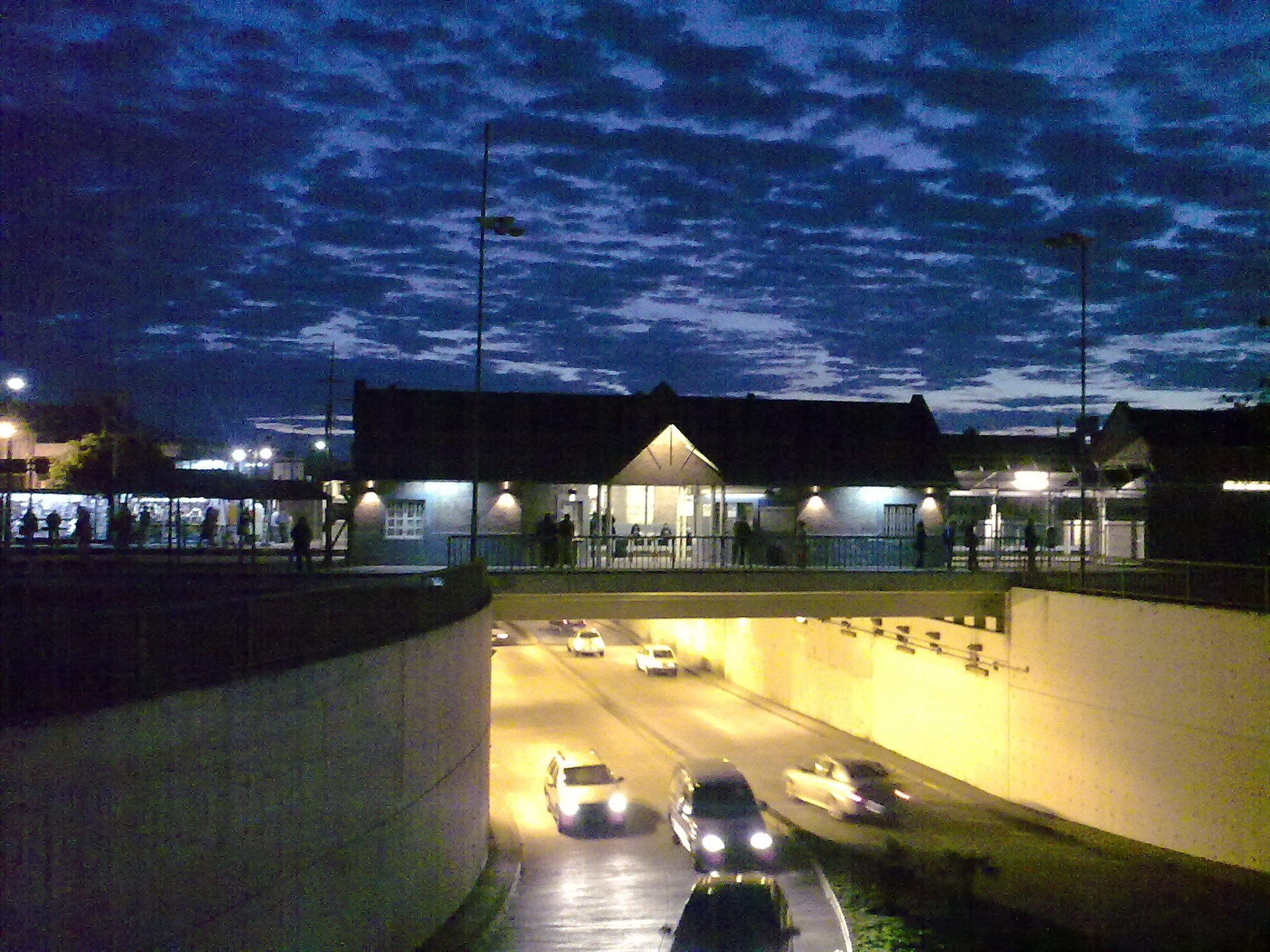 Estación de Villa Adelina - Amanecer